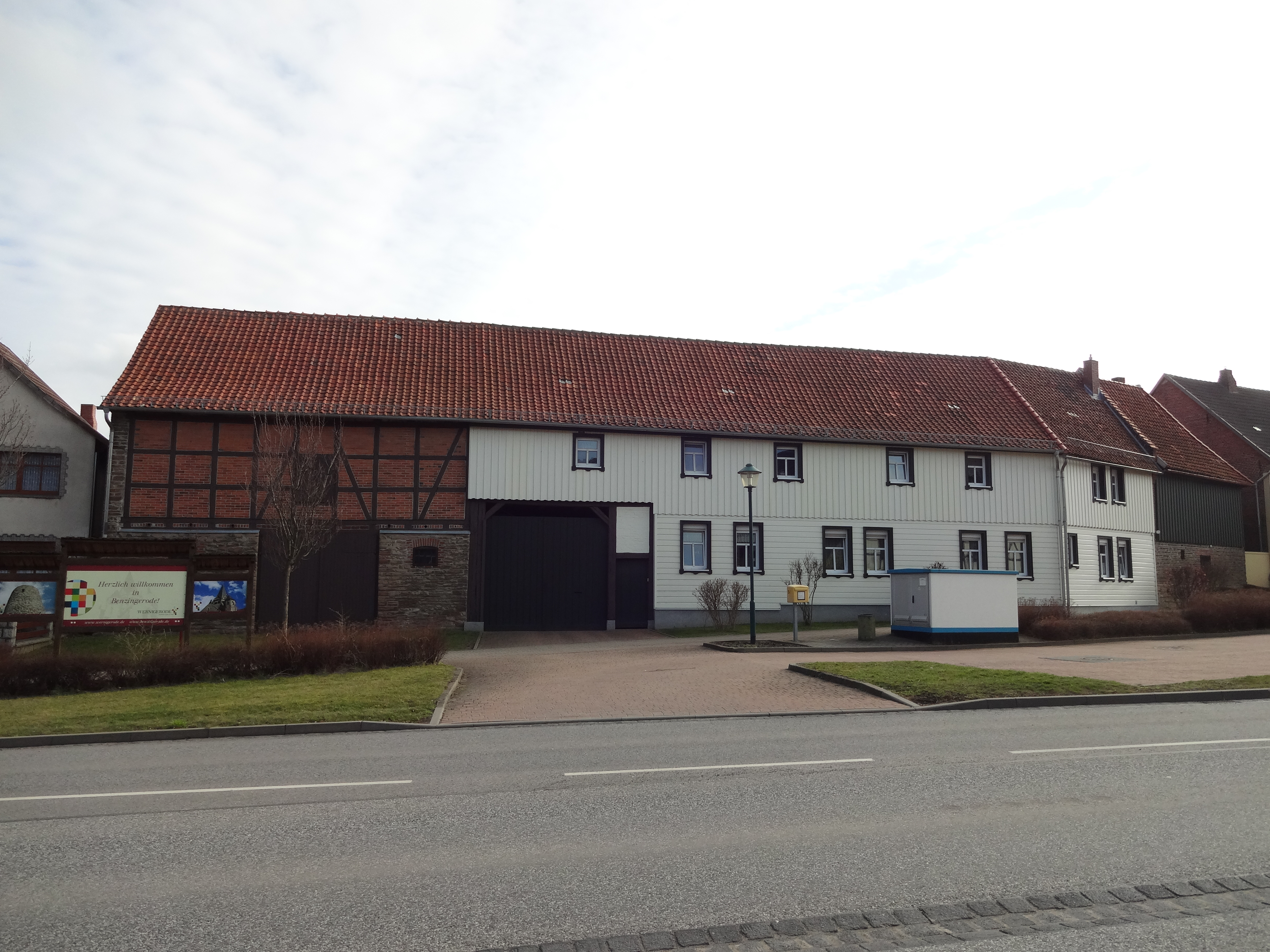 Denkmalgeschützter Bauernhof in der Blankenburger Straße 1 in Benzingerode (Ortsteil von Wernigerode)